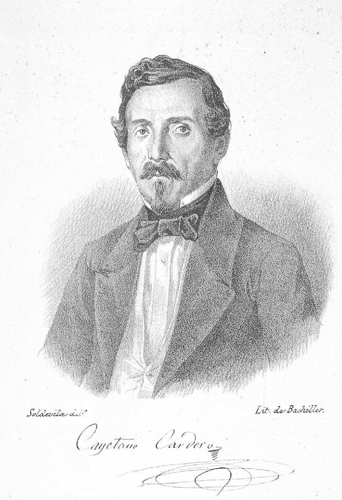 Cayetano Cardero, litografía de Doroteo Bachiller por dibujo de Ramón Soldevilla y Trepat.